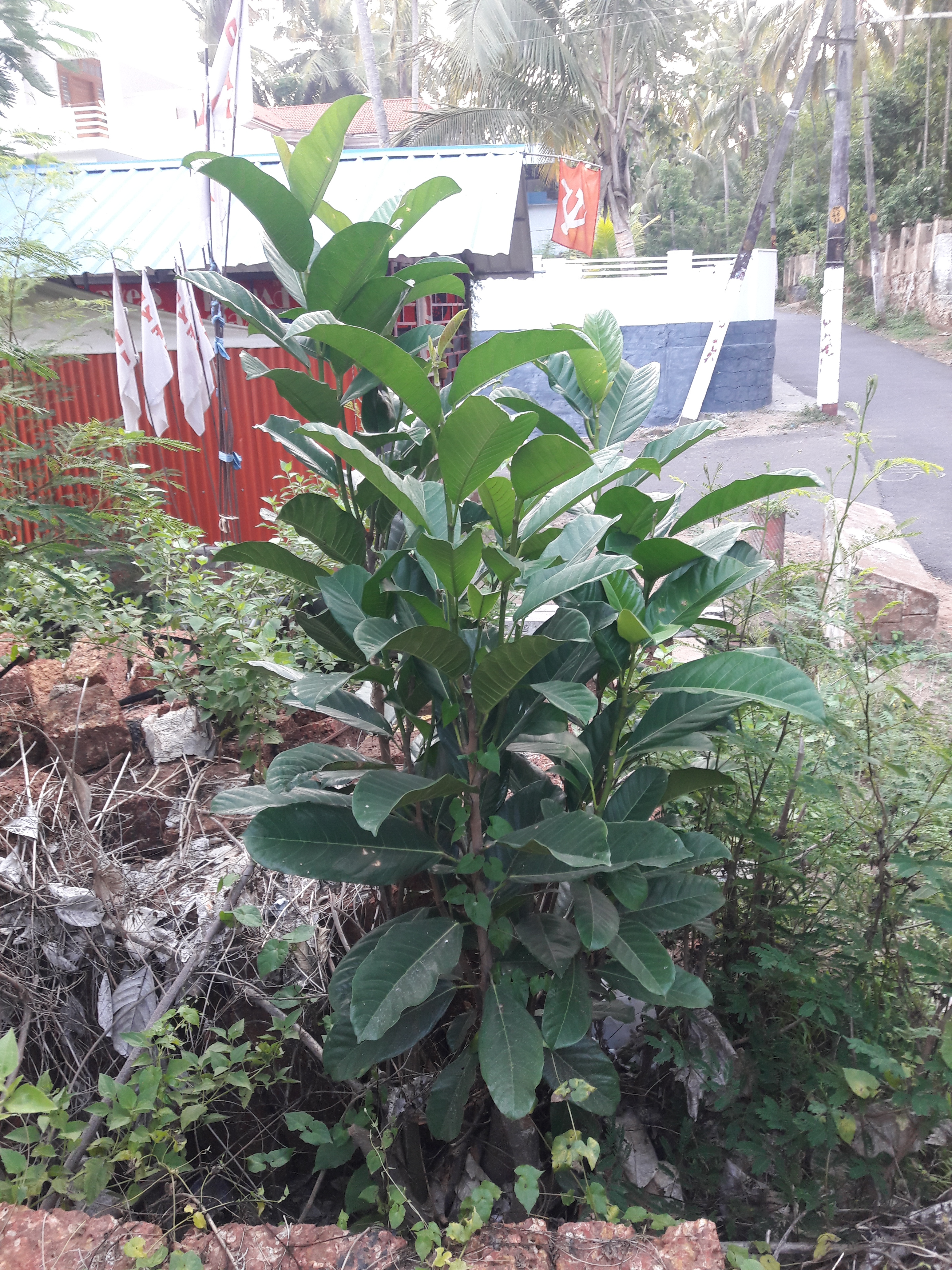 മലപ്പുറം ജില്ലയിലെ പൊന്നാനി താലൂക്കില്‍ എരമംഗലത്തിനടുത്ത് അരക്കിലാംകുന്ന് എന്ന സ്ഥലത്ത് വഴി വക്കില്‍ വളരുന്ന ഒരു കടപ്പിലാവ്. ശാസ്ത്രീയ നാമം Ficus callosa കുടുംബം Moraceae.